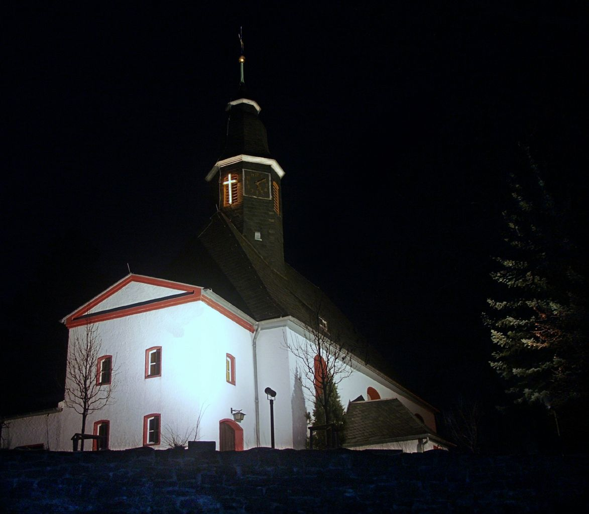 die angestrahlte Christuskirche Reichenhain(Chemnitz) bei Nacht